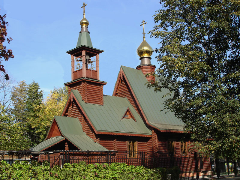 Храм святого праведного Иоанна Русского в Кунцеве, Москва, Россия